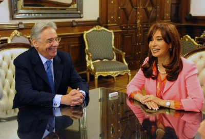 Cristina Fernández mantuvo una audiencia con el ex presidente de Brasil Fernando Henrique Cardoso